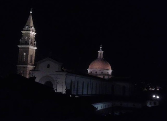 Veduta notturna della Basilica di Santo Spirito